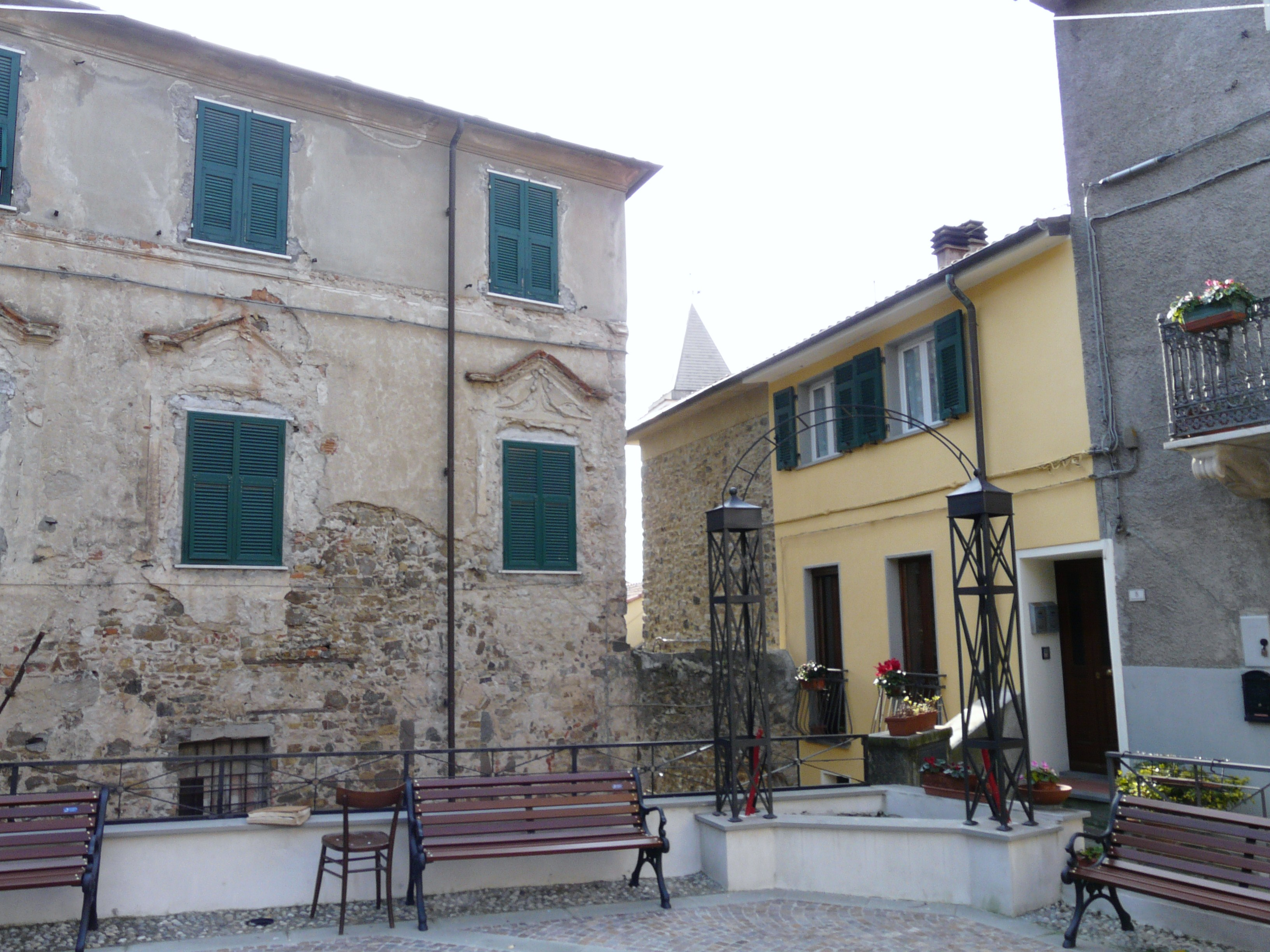 Bolano, Liguria, Italia